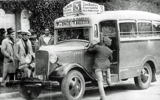 Chevrolet de 1934 ó 1935, de la desaparecida línea 3, que unía Plaza Miserere con Villa Ballester. Conserva la bandera de madera y el parabrisas pequeño característicos, pollera y puerta plegadiza (se adivina por el formato del escalón del estribo)